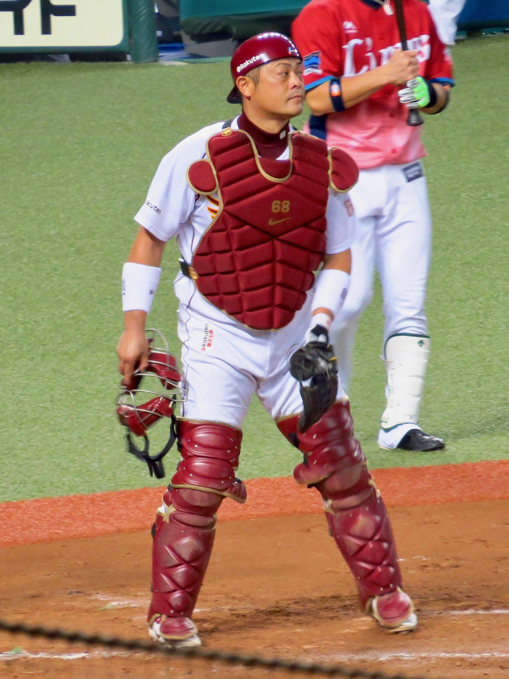 メットライフドームにて